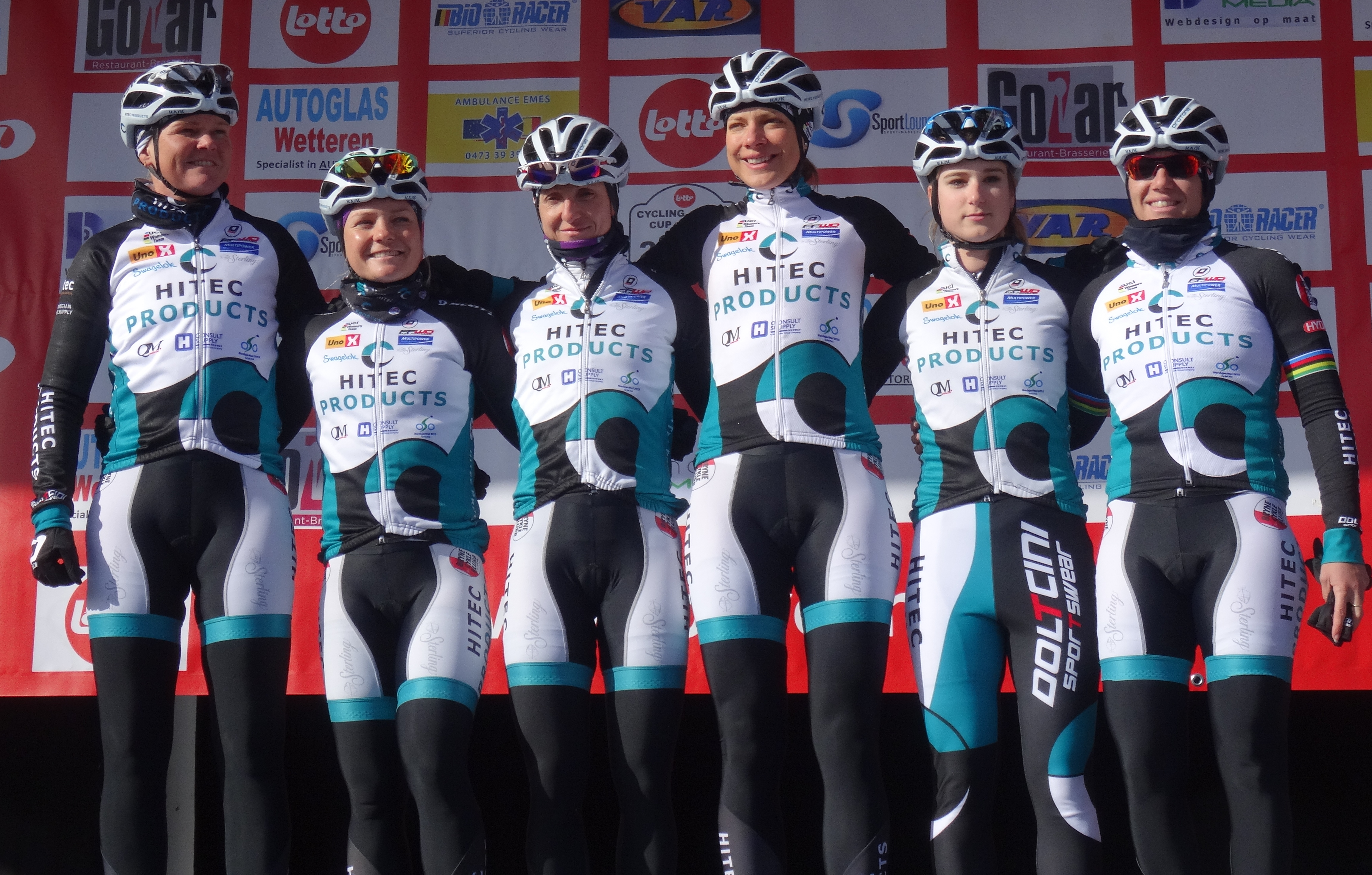 Reportage réalisé le mercredi 4 mars à l'occasion du départ du Samyn des Dames 2015 et du Samyn 2015 à Quaregnon, Belgique.